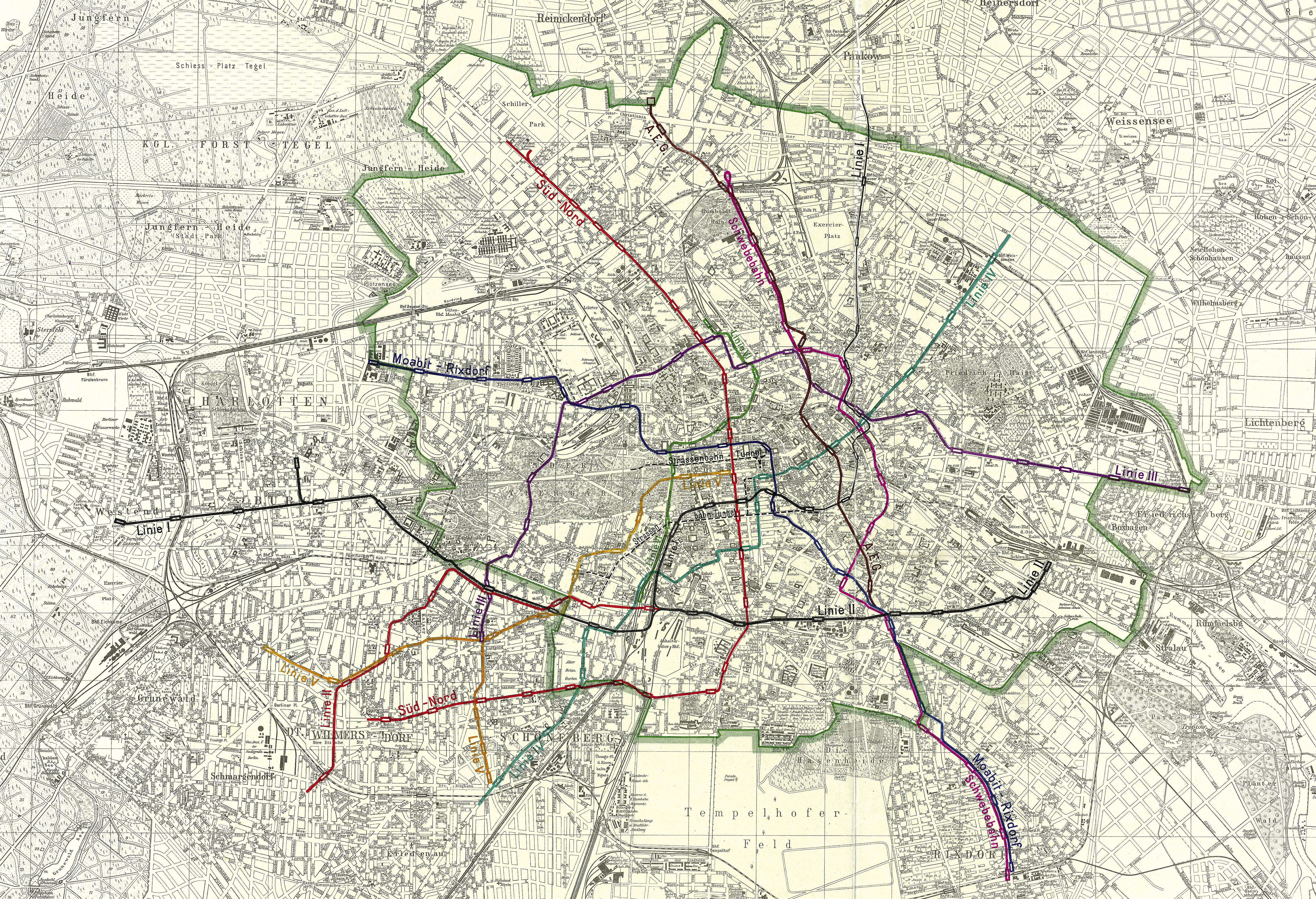 Der Titel steht rechts oben im Plan. Legende: "Städtische Bahnen, Hochbahn-Gesellschaft, AEG, Schwebebahn-Gesellschaft, Grosse Berliner Strassenbahn, jetzige Weichbildgrenze". In der Karte ist der Entwurf einer Schwebebahn zwischen Gesundbrunnen und Rixdorf eingezeichnet und konkurrierend dazu der als teilweise Hoch- und U-Bahn projektierte Entwurf der AEG, woraus sich die U-Bahnlinie 8 entwickelte. Die Pläne zur Schwebebahn wurden um 1910 fallen gelassen.